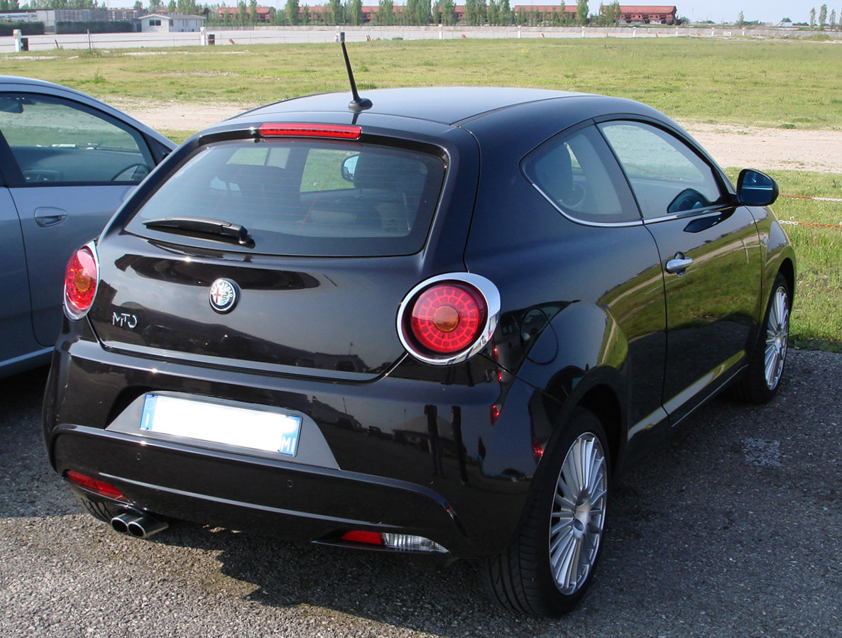 Alfa Romeo MiTo, modello nero, vista frontale, fotografata in un parcheggio dell'autodromo internazionale di Adria